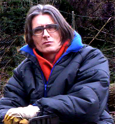 Mauro Biuzzi durante il taglio della sua castagneta.